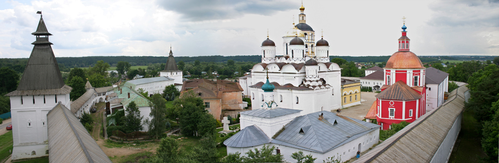 Ансамбль Пафнутьев-Боровского монастыря (Калужская область, Боровск, село Роща, Дмитрова улица (город Боровск))